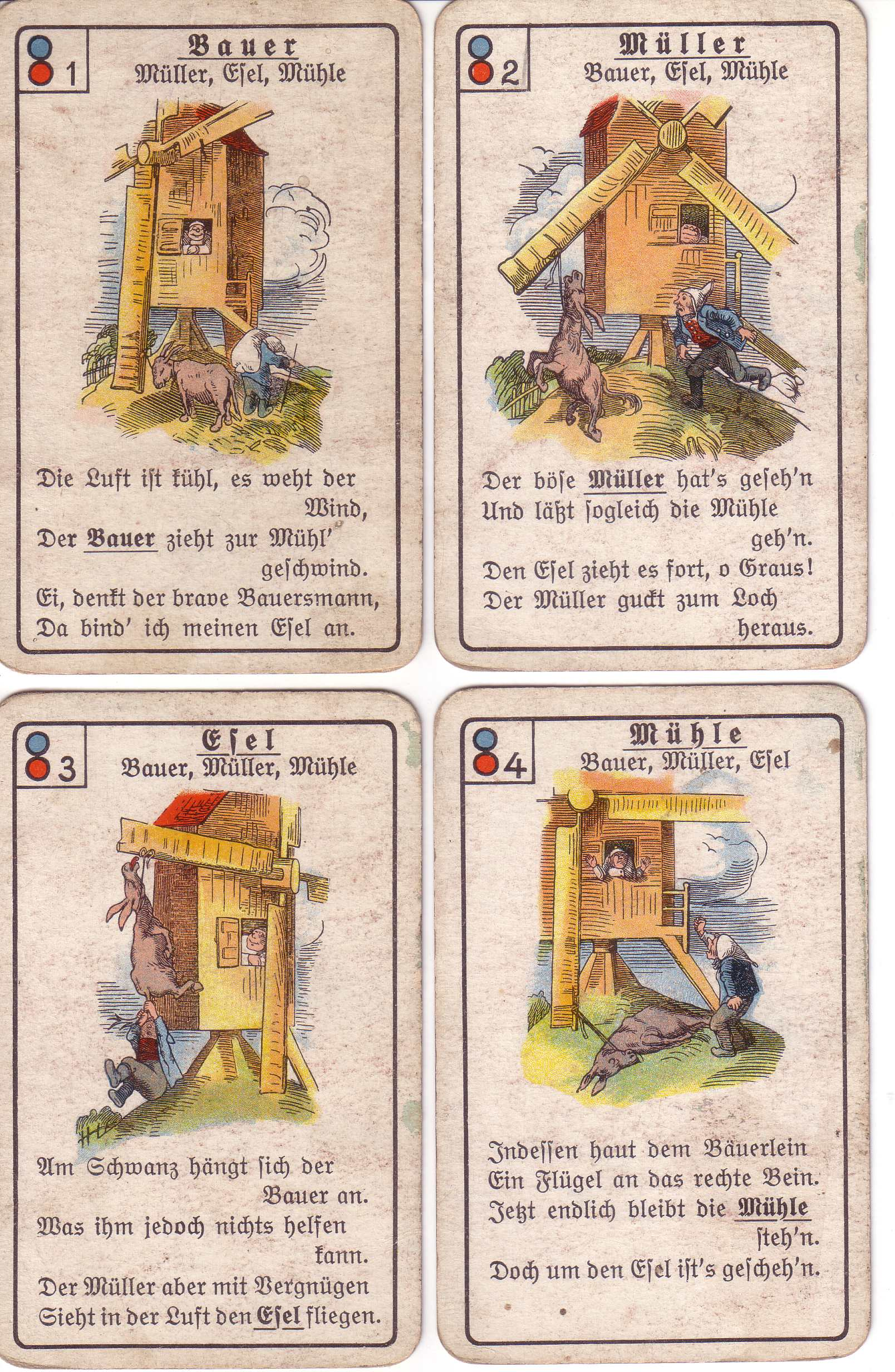 Quartettspiel Wilhem Busch.